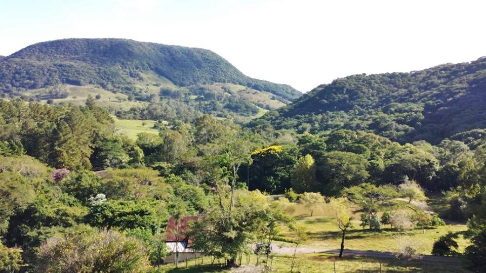 Vista da 4º colonia